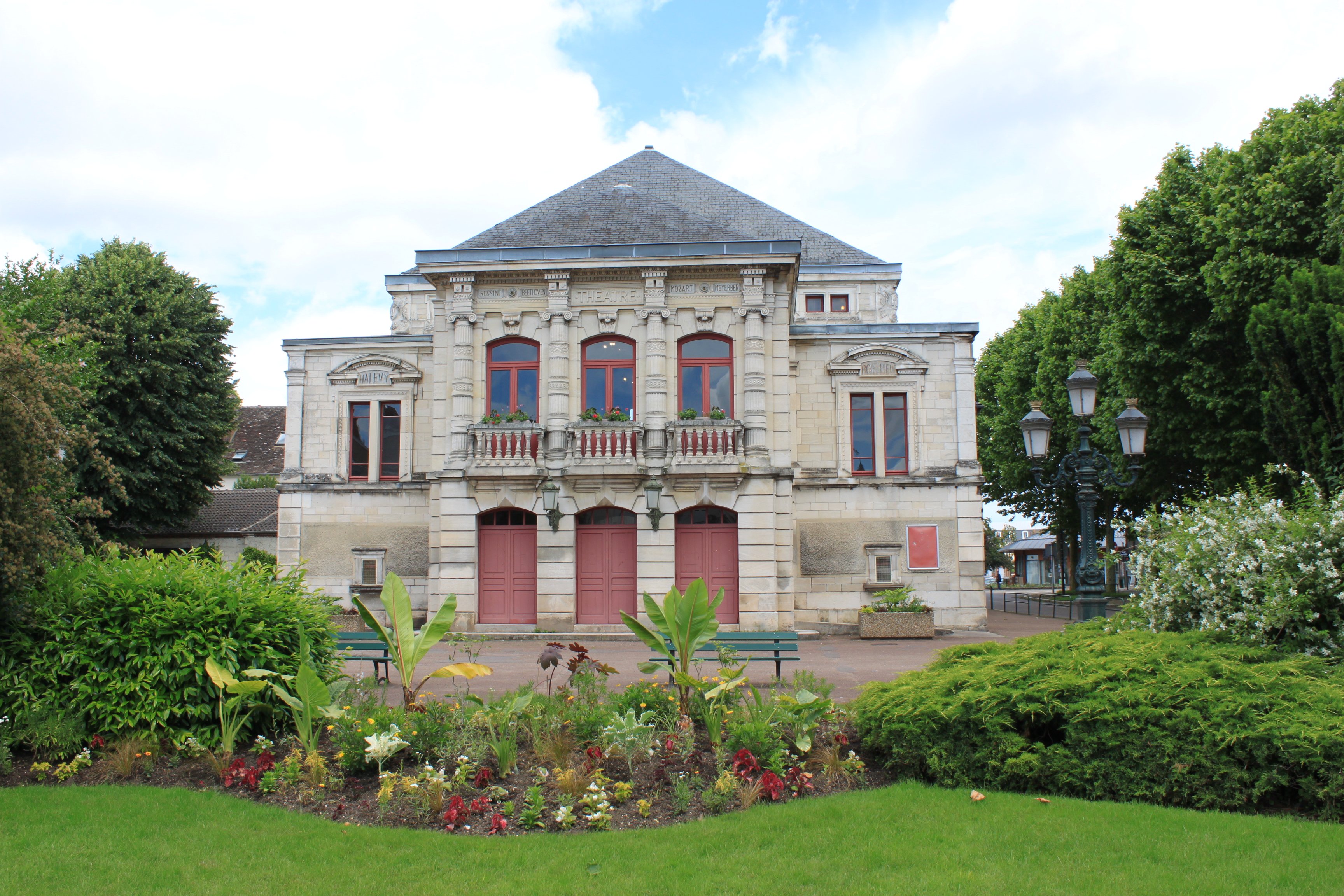 Sens, Yonne, Bourgogne, France